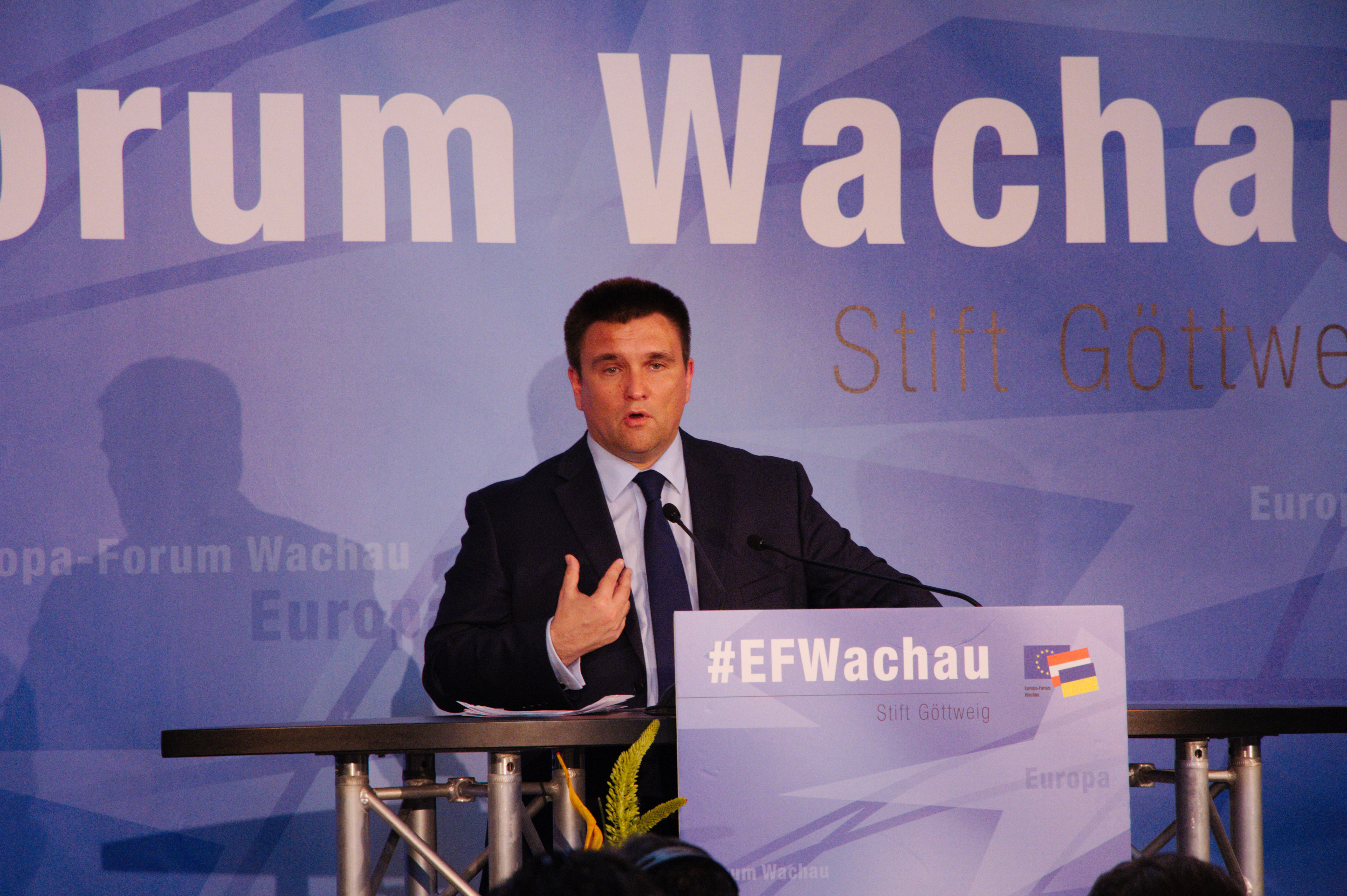 Pawlo Klimkin, Minister für auswärtige Angelegenheiten der Ukraine beim Europa-Forum Wachau